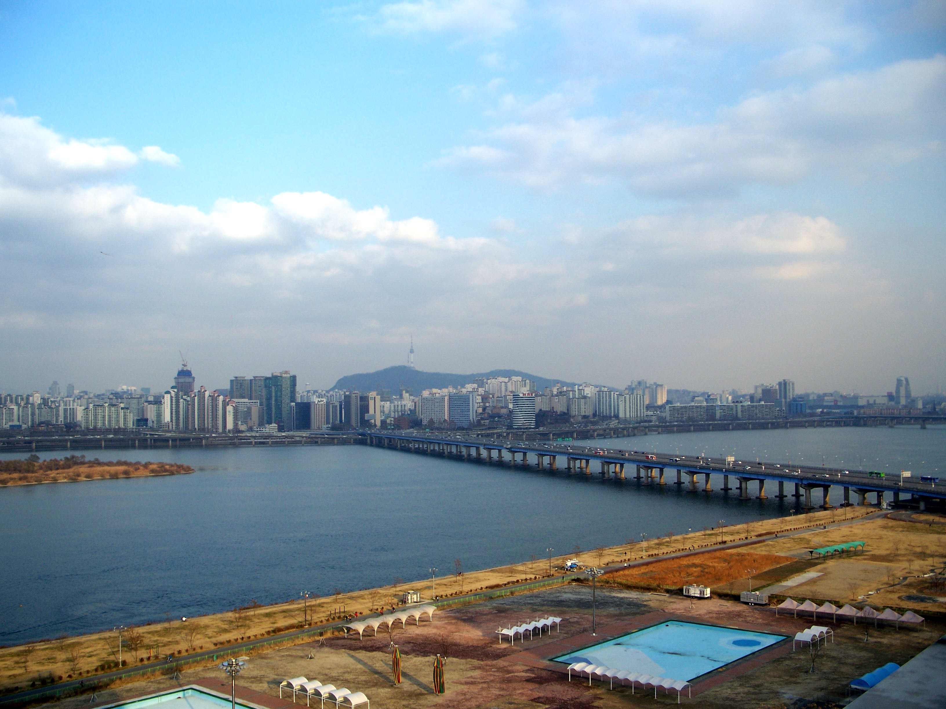 마포대교.jpg